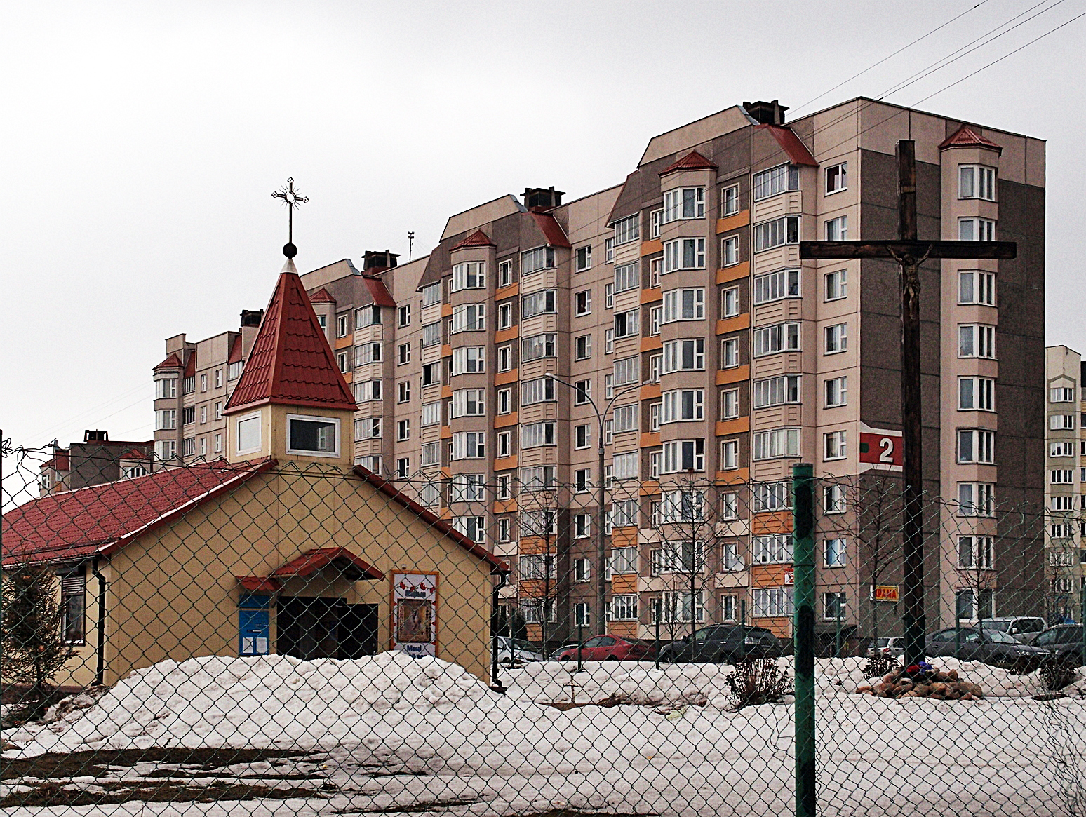 Church in Lošyca. Касьцёл у Лошыцы